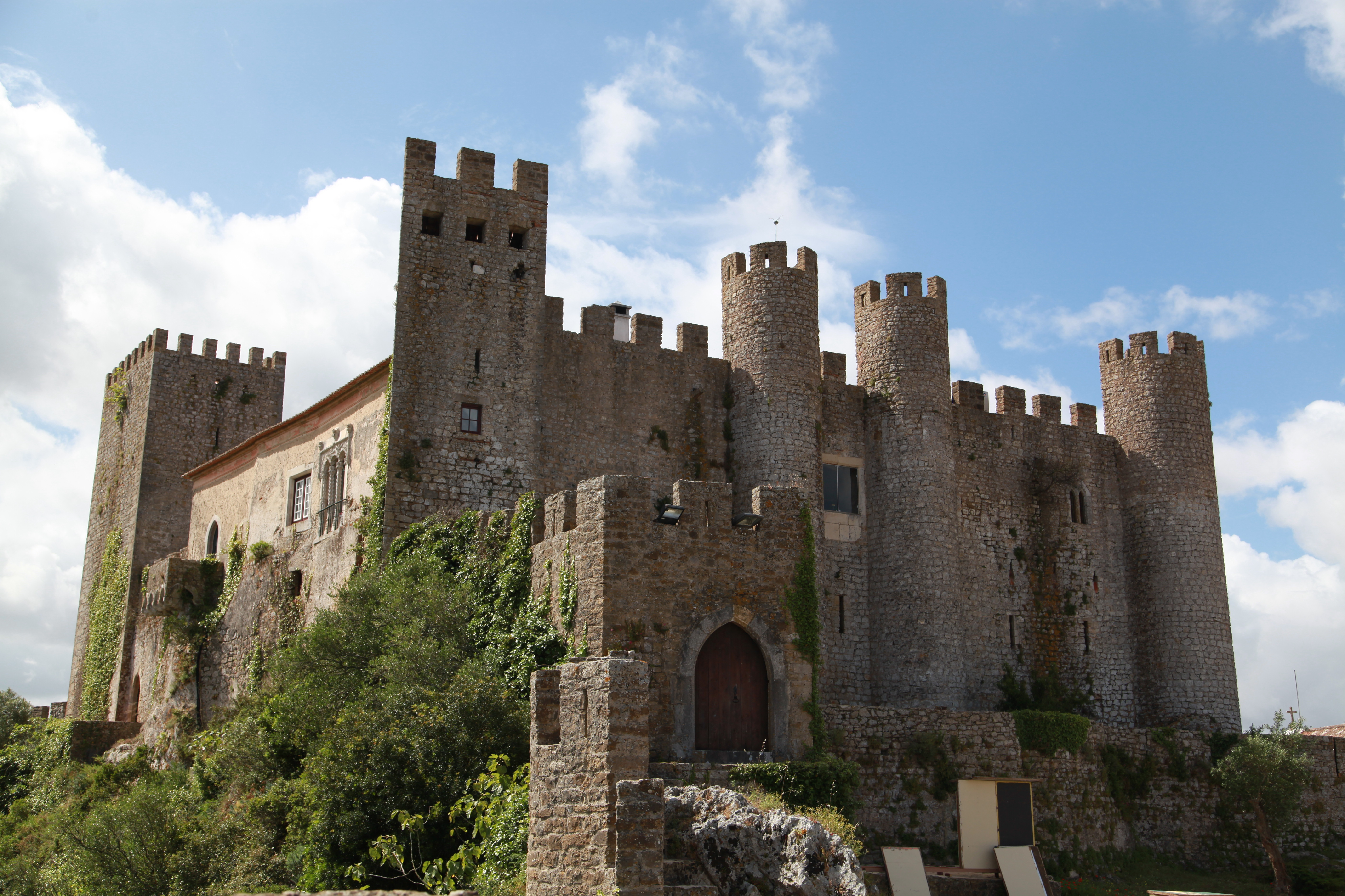 Obidos